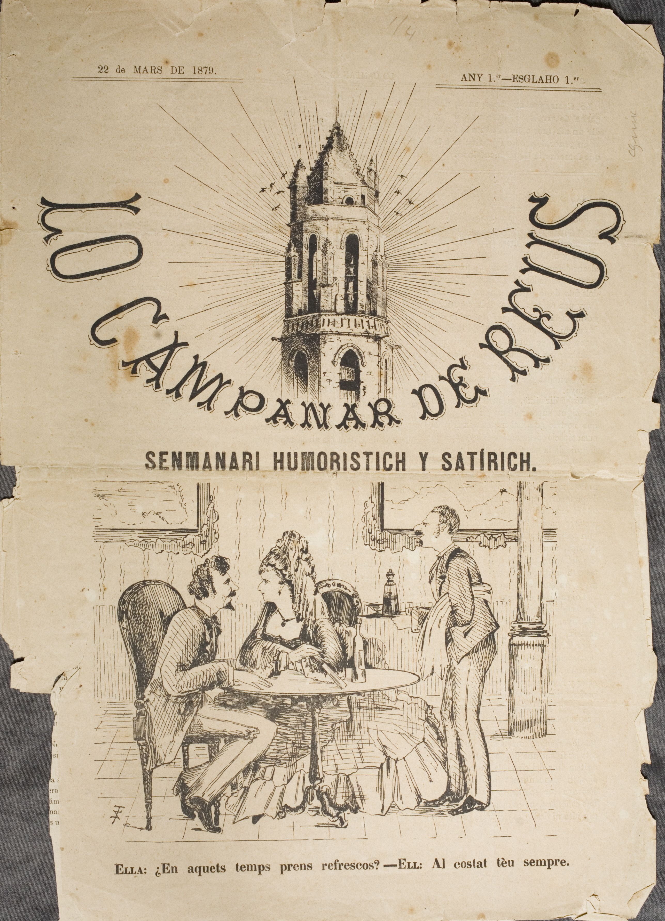 Primera pàgina del número 1 de Lo campanar de Reus